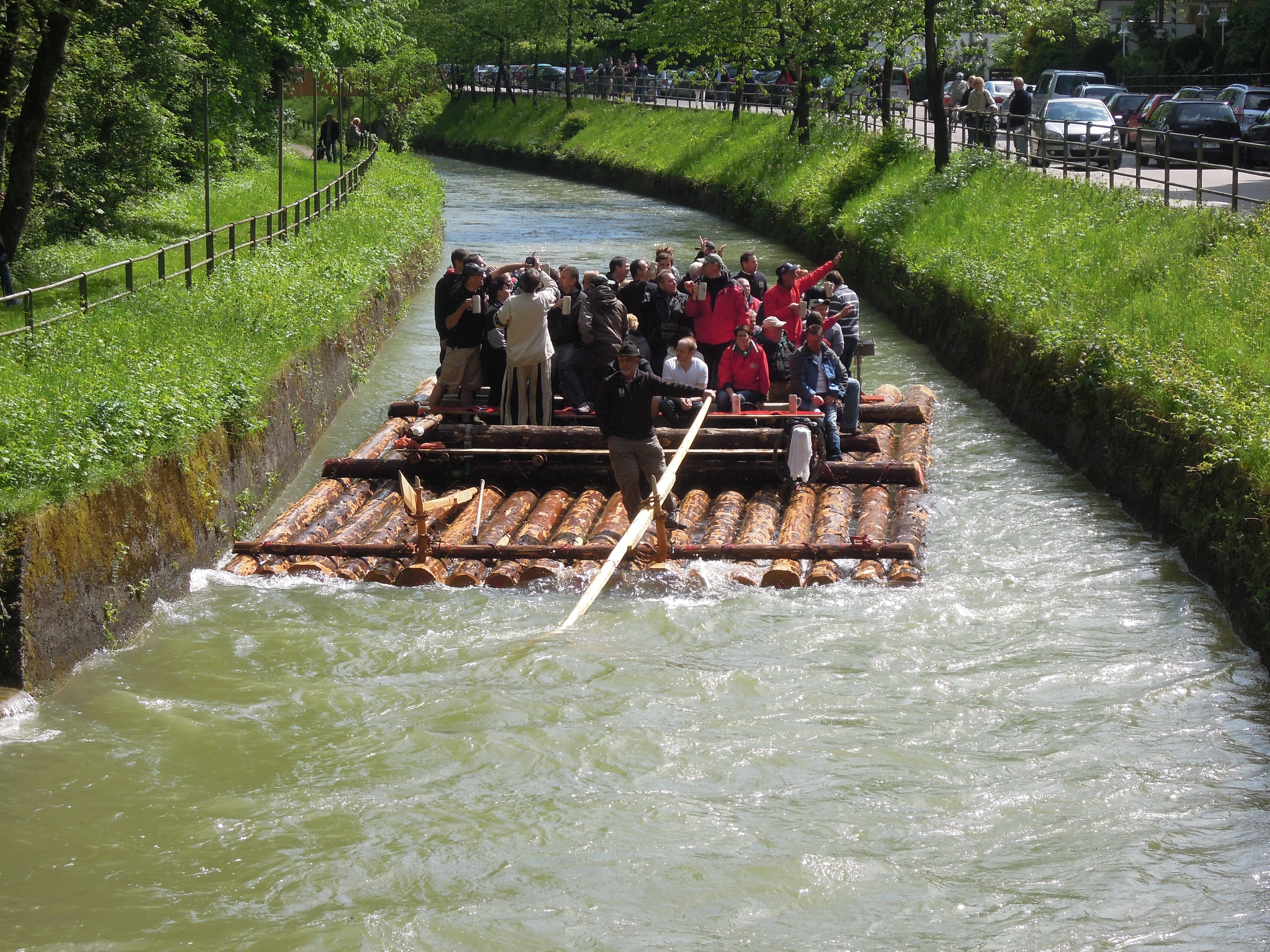 München: Floßfahrt auf dem Ländkanal in Thalkirchen